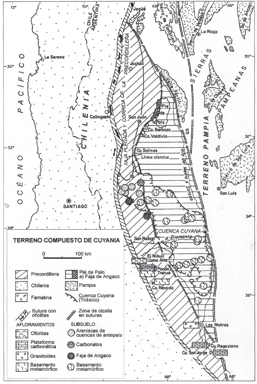 Terreno de Cuyania, limites y edades. Tomado de Ramos et al 1998